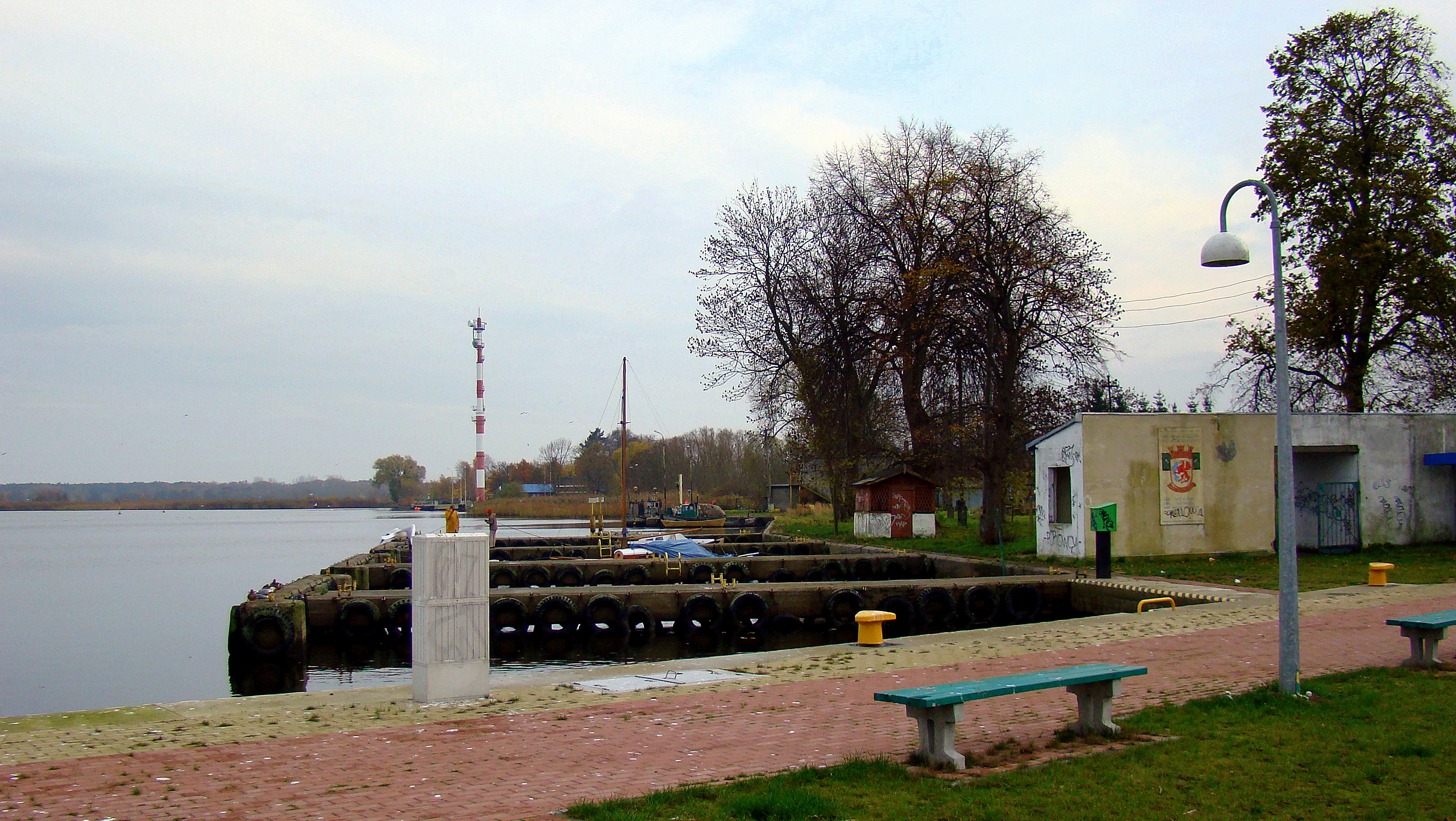 Port Nowe Warpno, Województwo zachodniopomorskie, Polska